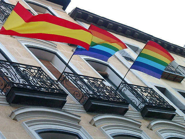 Orgullo Madrid 2007 - Banderas